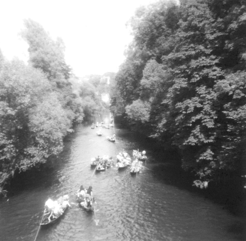 Tübinger Stocherkahnrennen 1977 kurz nach dem Start.